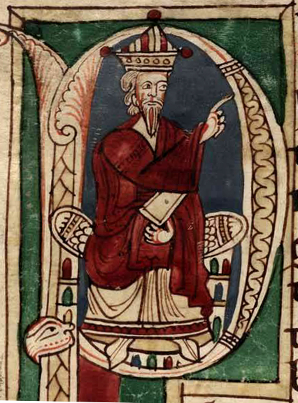 Detalle del folio 18 recto del manuscrito 2805 de la Biblioteca Nacional de España (Mss. 2805), titulado en el registro Corpus Pelagianum et alia scripta minora, siglo XII. La miniatura es una Inicial P de personaje, quizá el obispo Dulcidio, sentado en un taburete arquitectónico, vistiendo túnica marfil y manto granate, con mitra triangular y sostieniendo un libro en su mano izquierda y con la derecha extendida, en actitud de bendecir; le acompañan animales monstruosos y grifos.